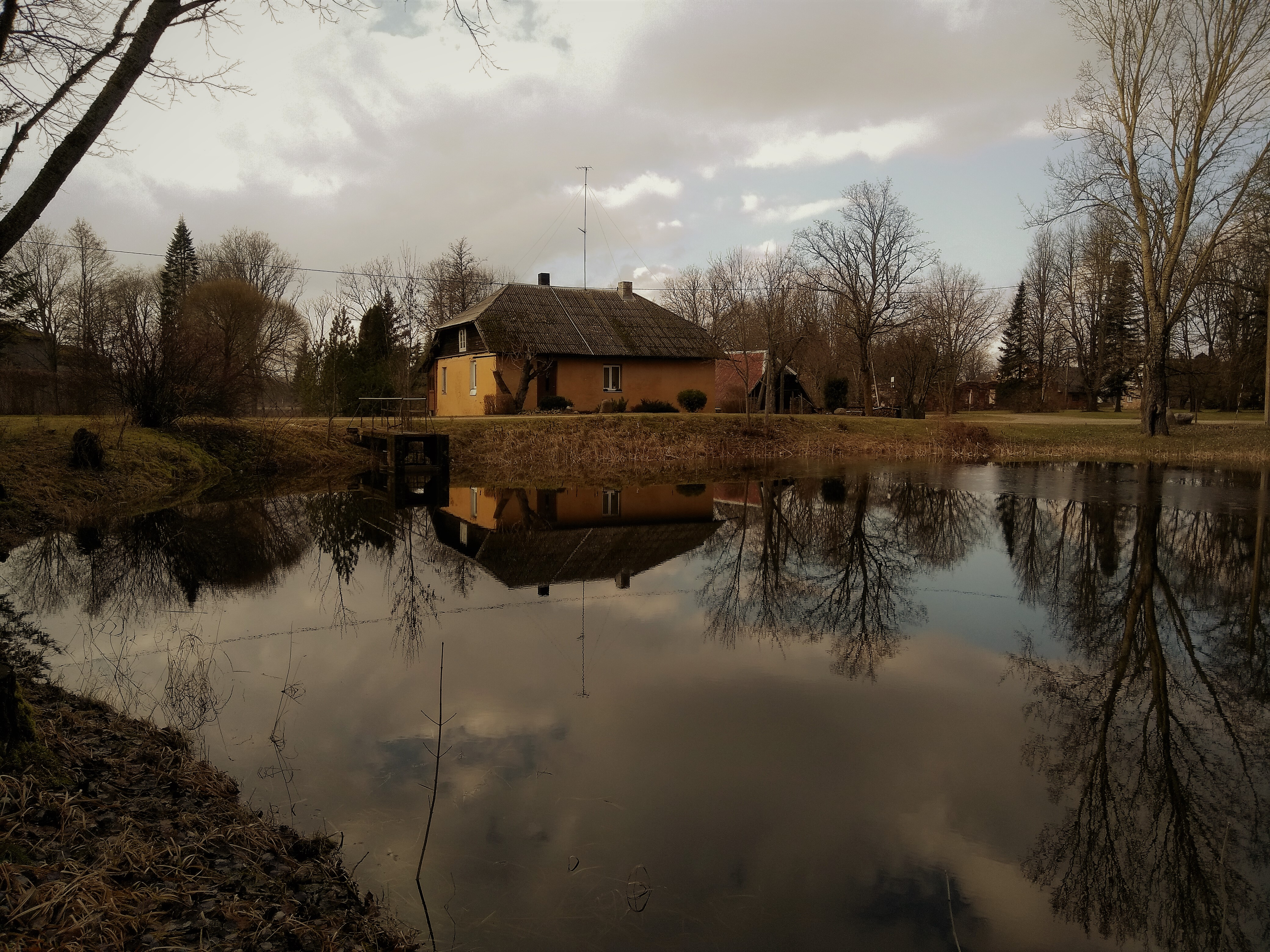 Vaade linnuseala kirdenurgast üle paisjärve loodesse, kunagise Nurmeveski veskikoha suunas.